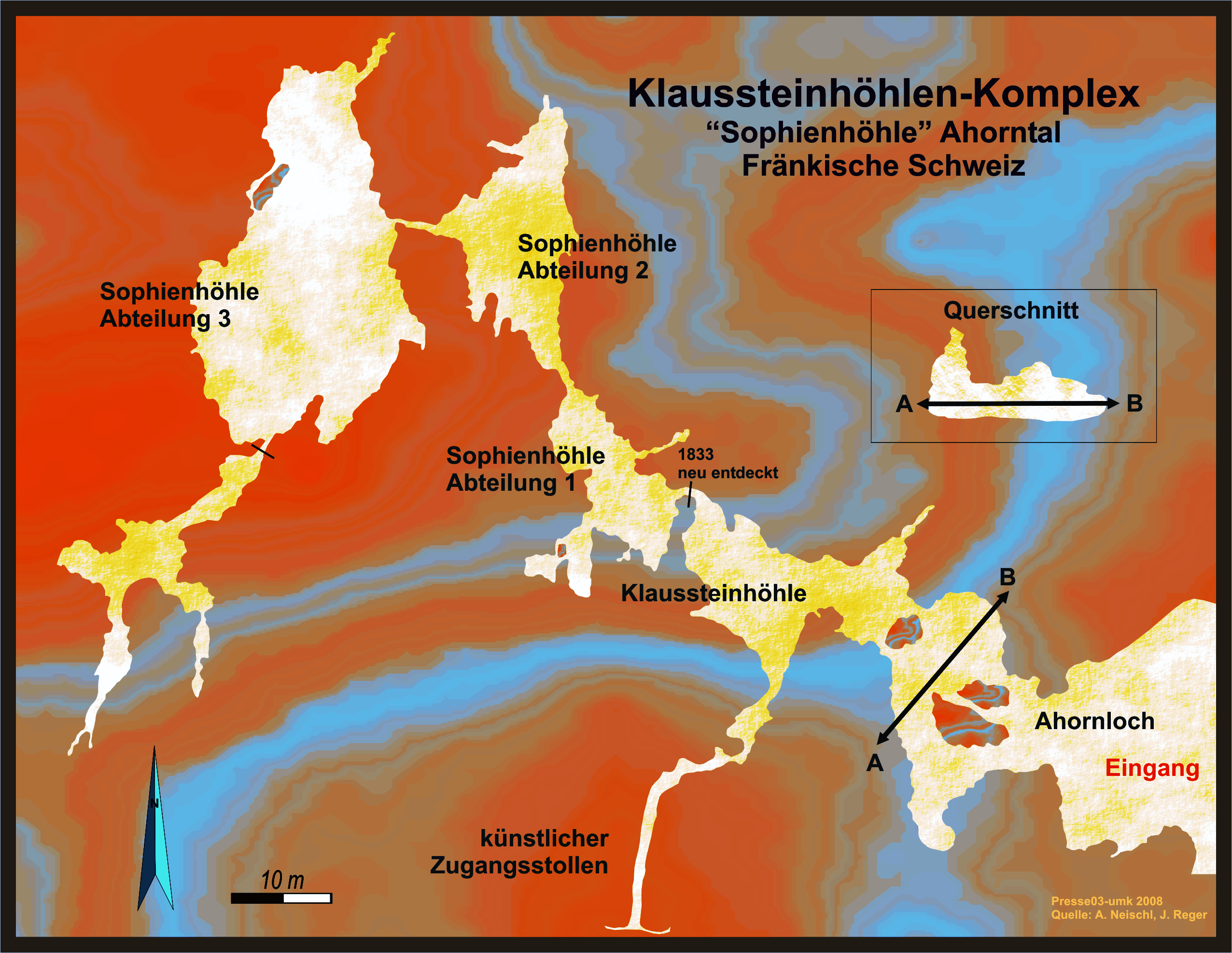 Plan der Sophienhöhle bei Ahorntal, Fränkische Schweiz